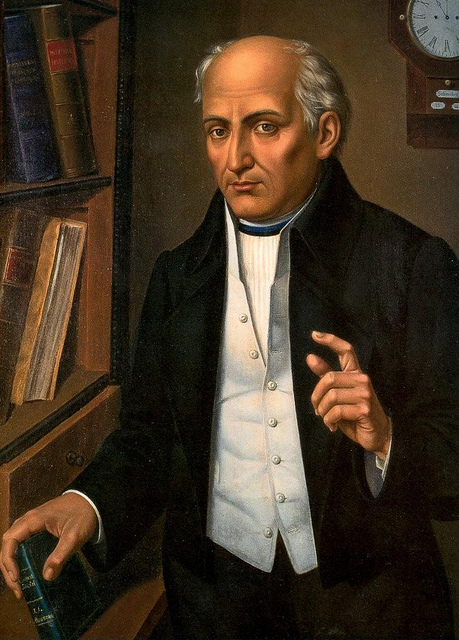 Miguel Hidalgo, siglo XIX, imagen tomada de: Jean Meyer, “Hidalgo”, en La antorcha encendida, México, Editorial Clío, 1996, p. 2.